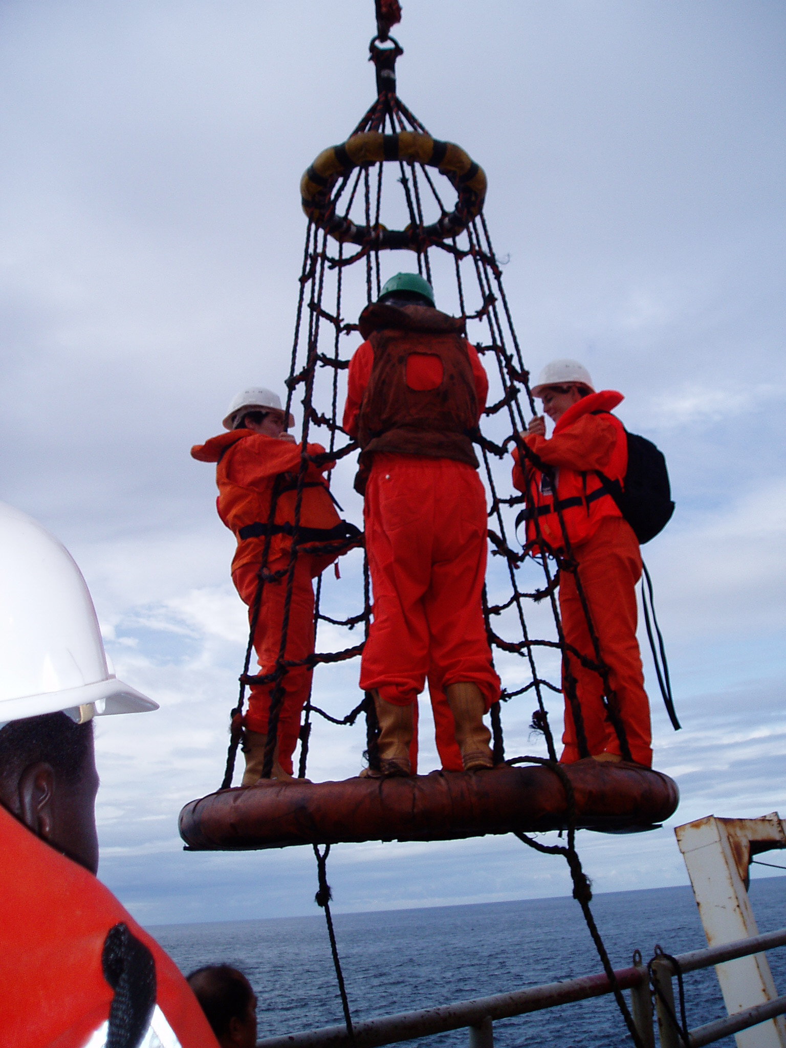 avec le partenaire